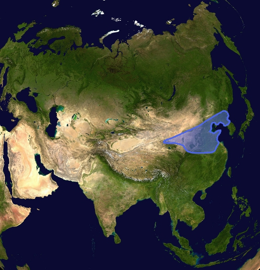 Localizzazione del cratone Sino-Coreano (o della Cina Settentrionale)